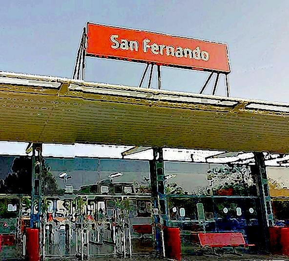 El apeadero de San Fernando se haya sito en el término municipal de Coslada.